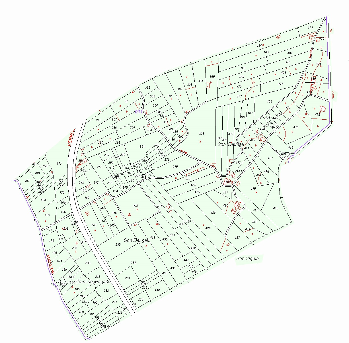 Plànol parcelari del Cadastre